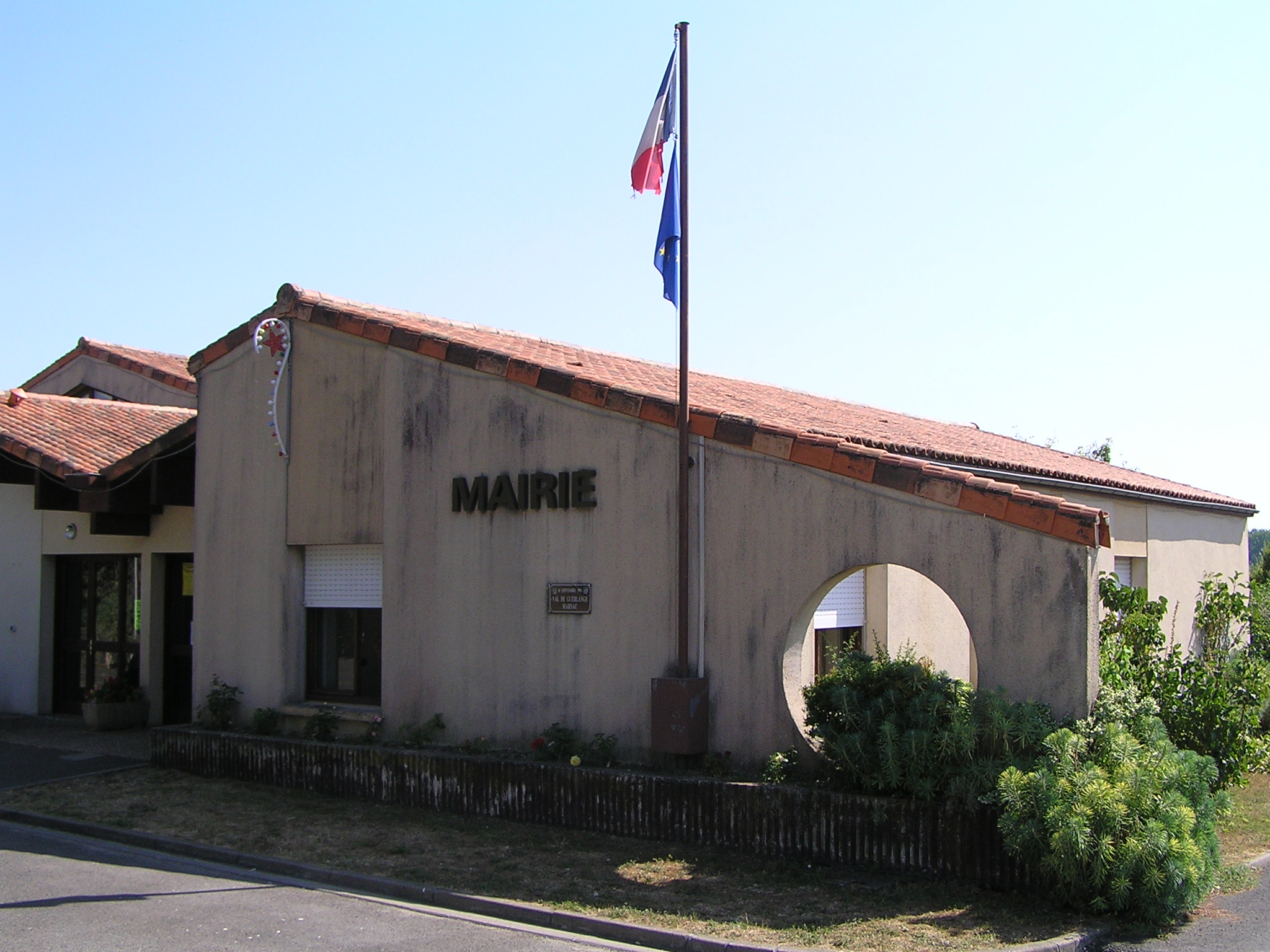 mairie de Marsac